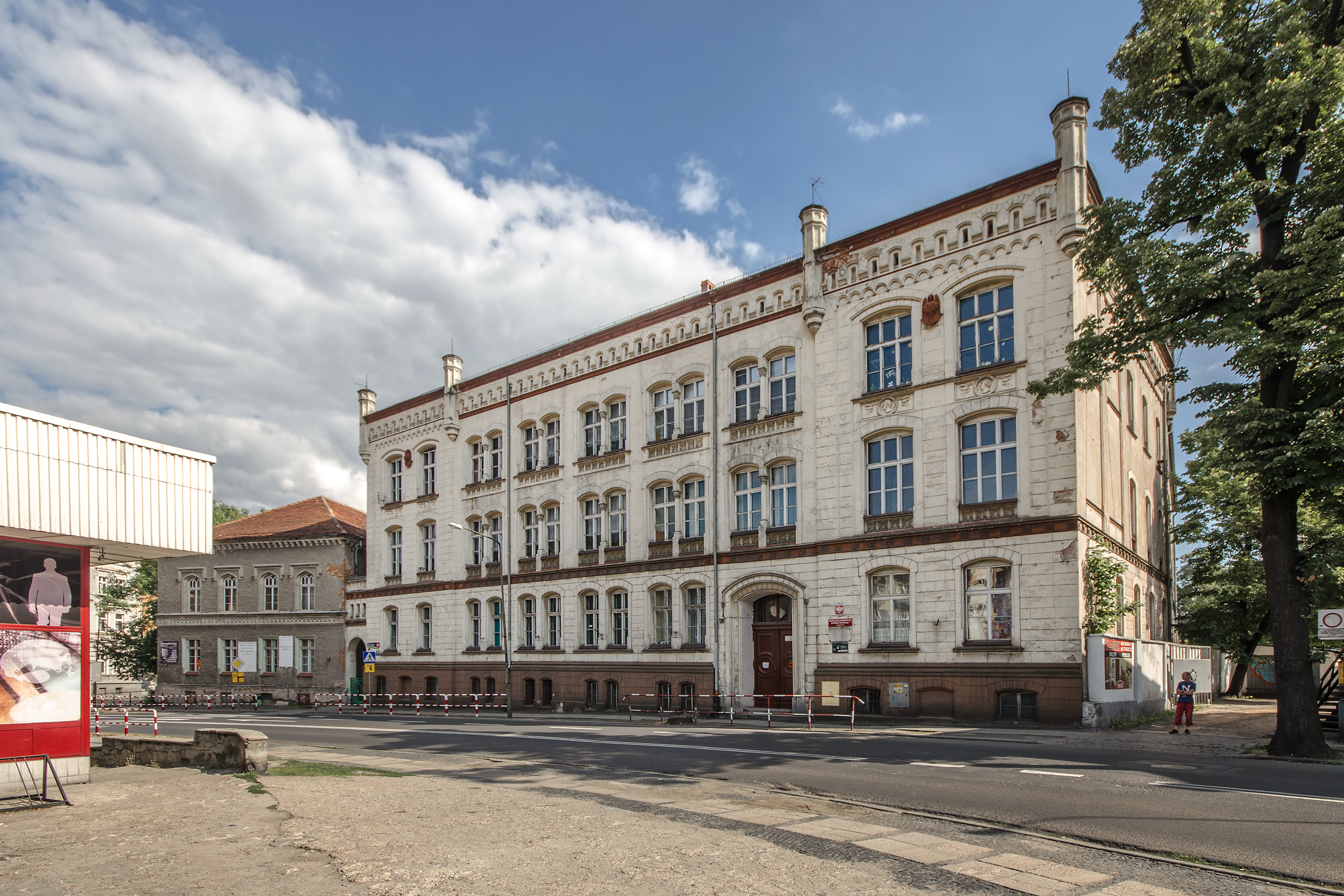 Brzeg, szkoła